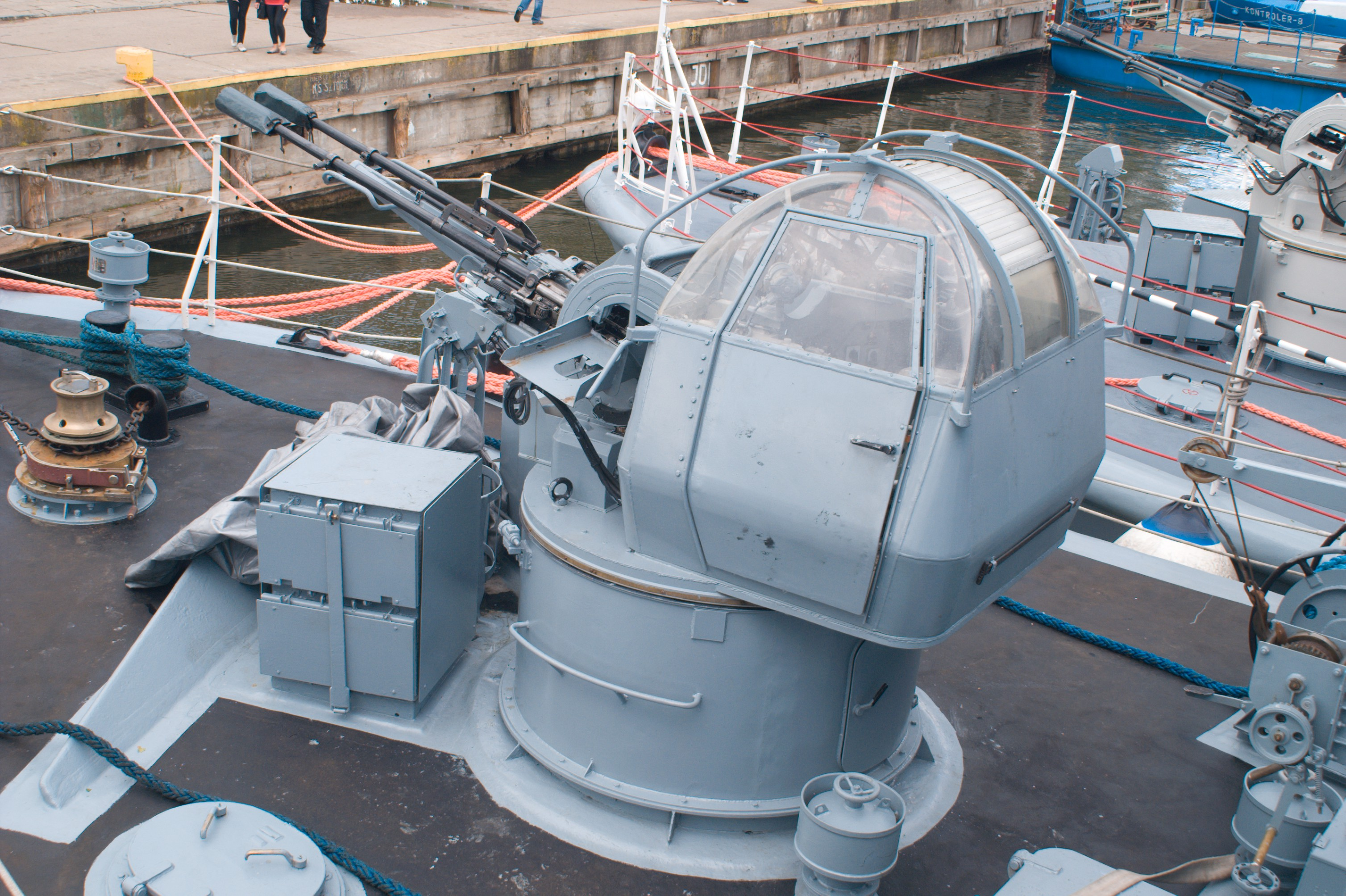 Trałowiec w basenie Prezydenta w Gdyni. Manewry Baltops 2012.